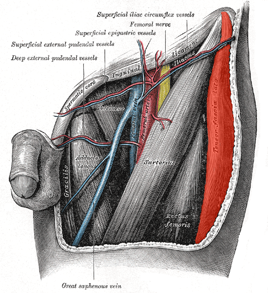 Tensor_fasciae_latae muscle